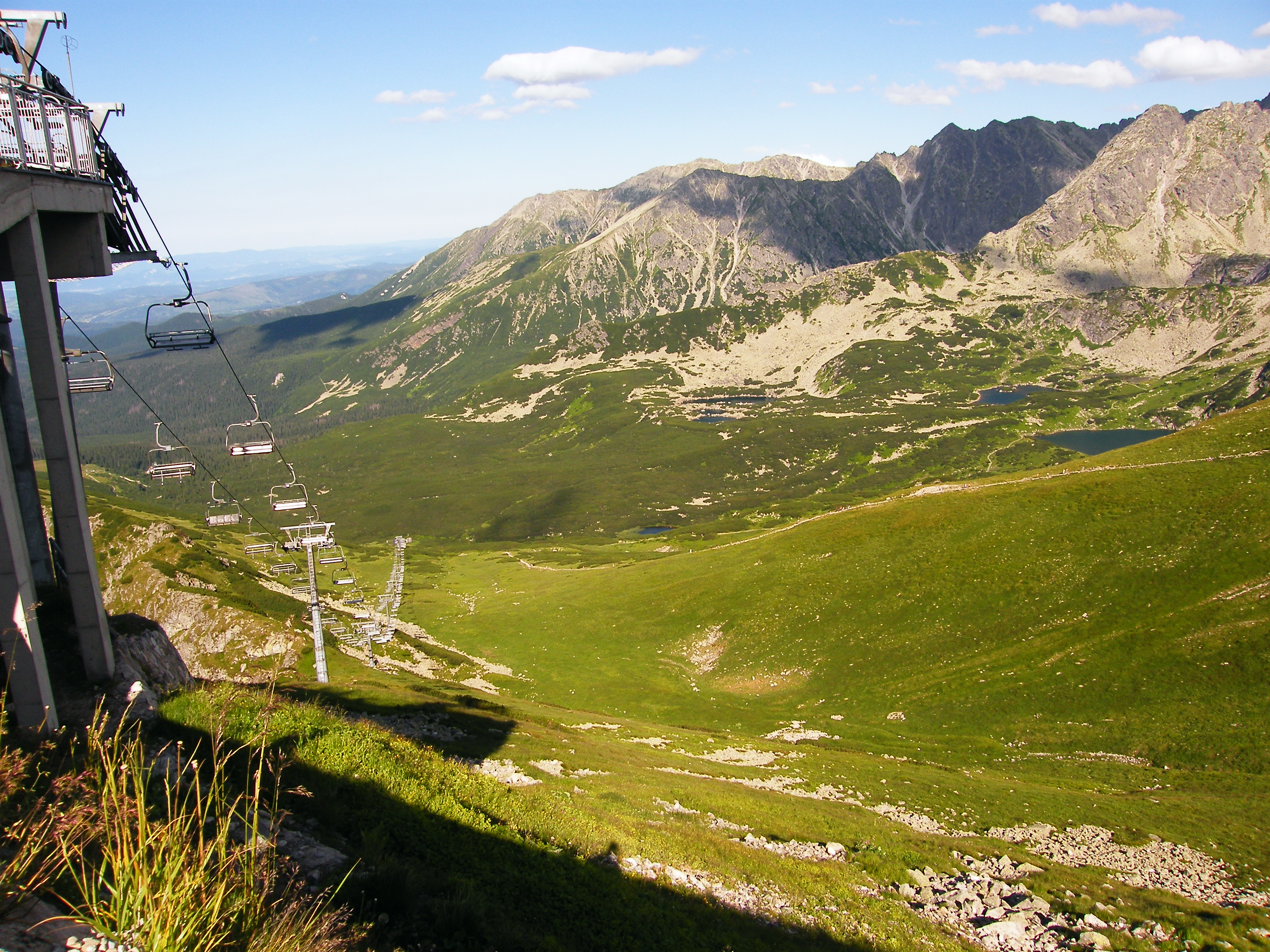 wyciąg na Kasprowy Wierch